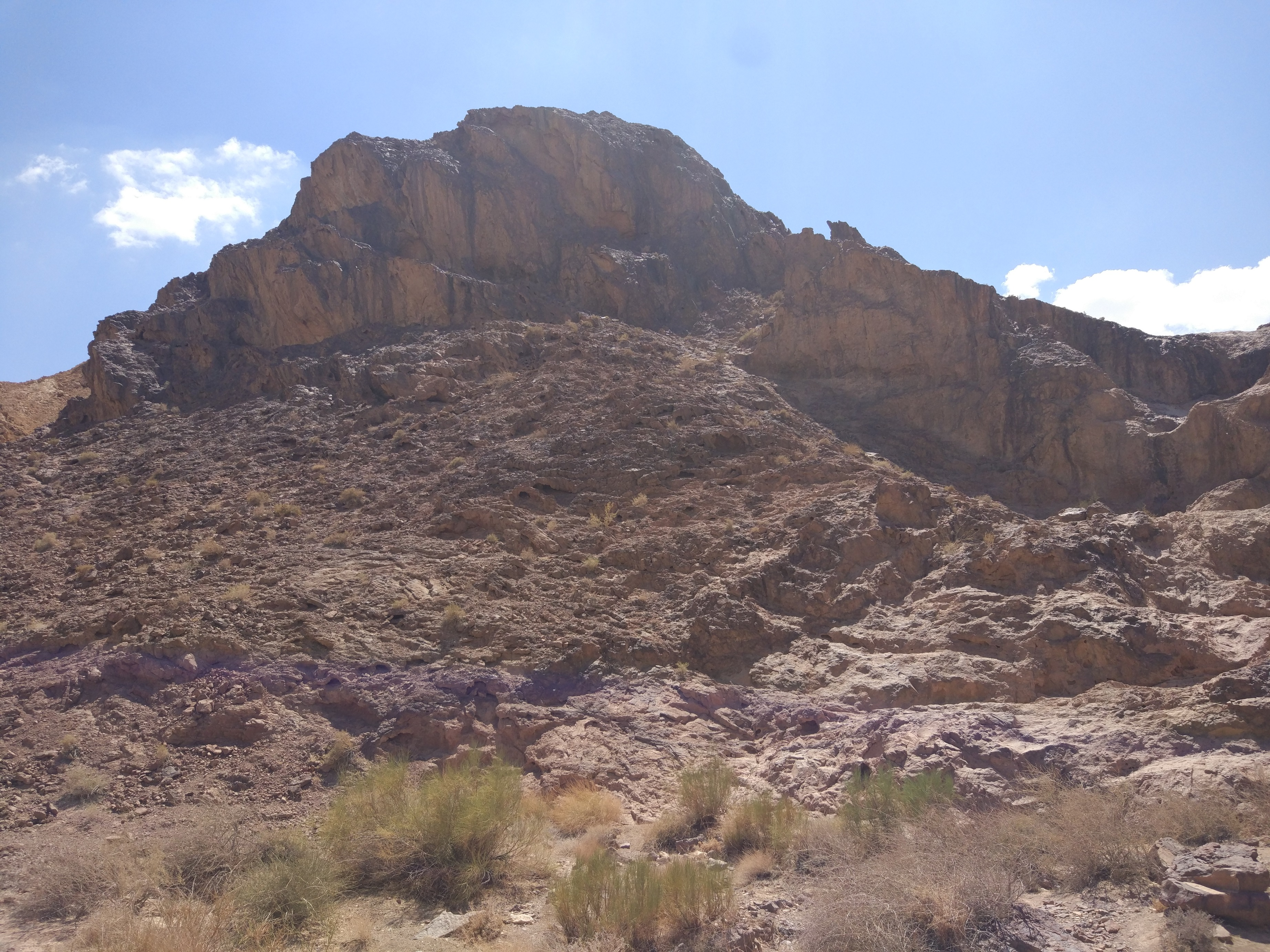 גבנון בעמק הגבנונים במכתש רמון. הגבנון נמצא בצמוד לכביש 40